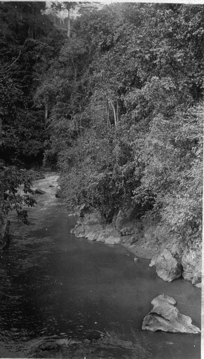 Foto. Tjigembang-rivier bij Tanggeung, West-Java